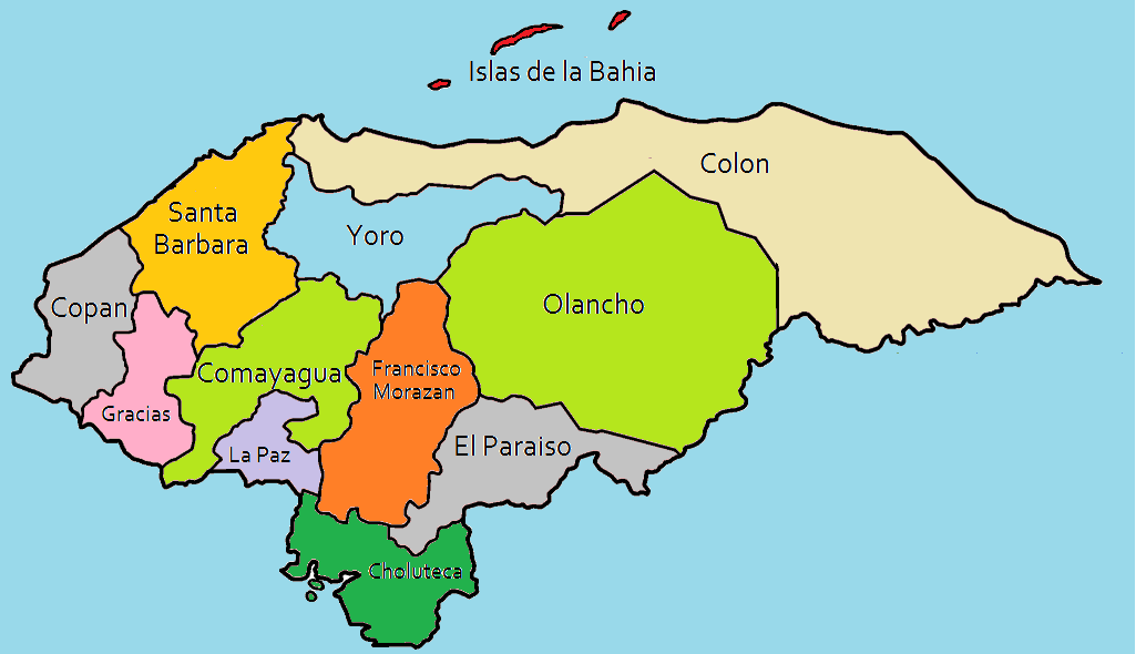 Division poltica de Honduras